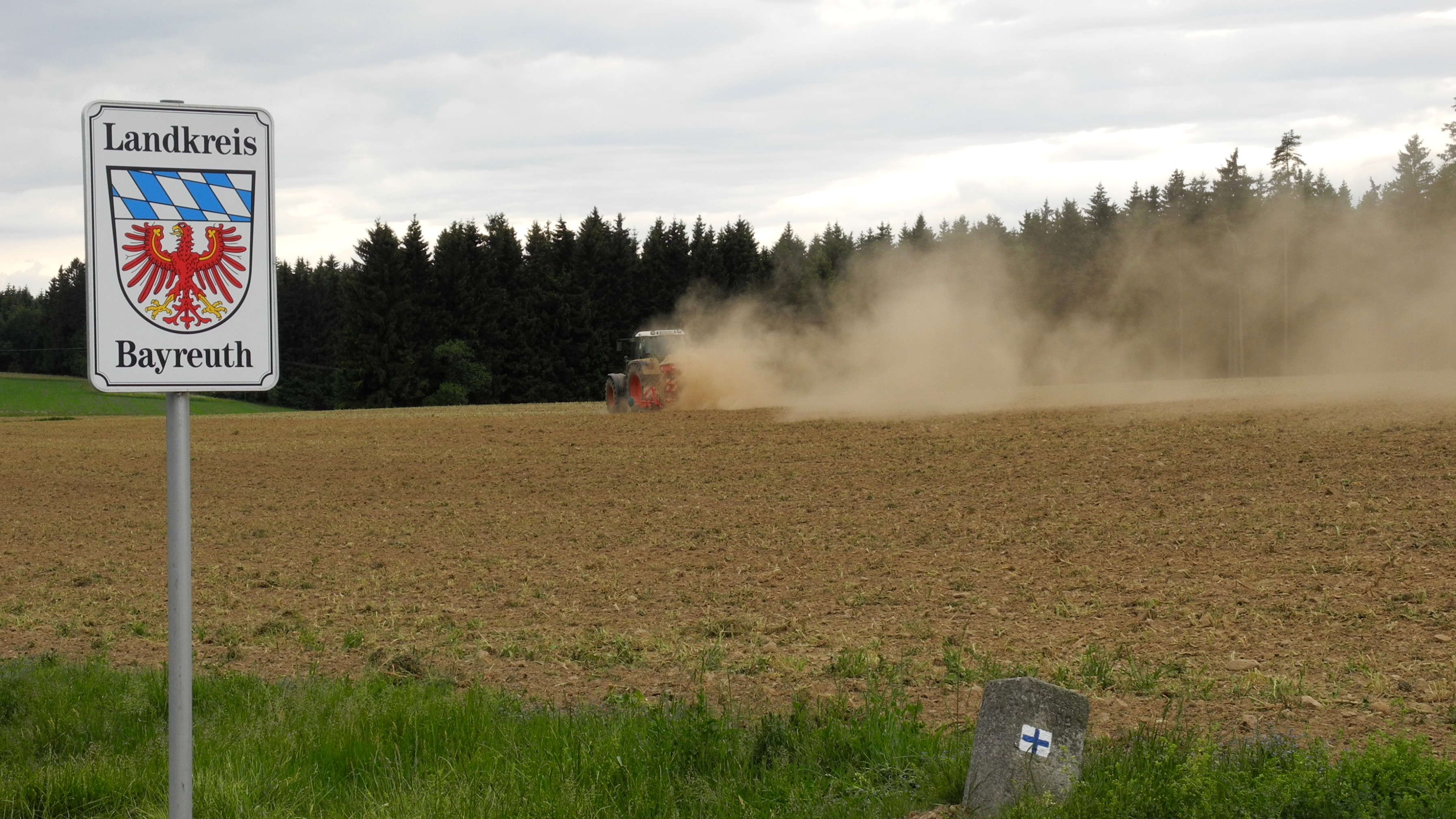 Ein Traktor fährt mit Staubfahne durch Trockenheit nahe dem oberfränkischen Gefrees.